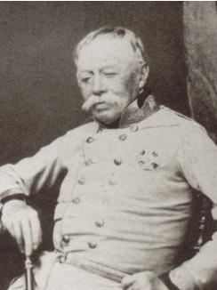 Maréchal autrichien Joseph Radetzky né le 2 novembre 1766 à Trebnitz (auj. Trebenice, Bohême), mort le 5 janvier 1858 à Milan.